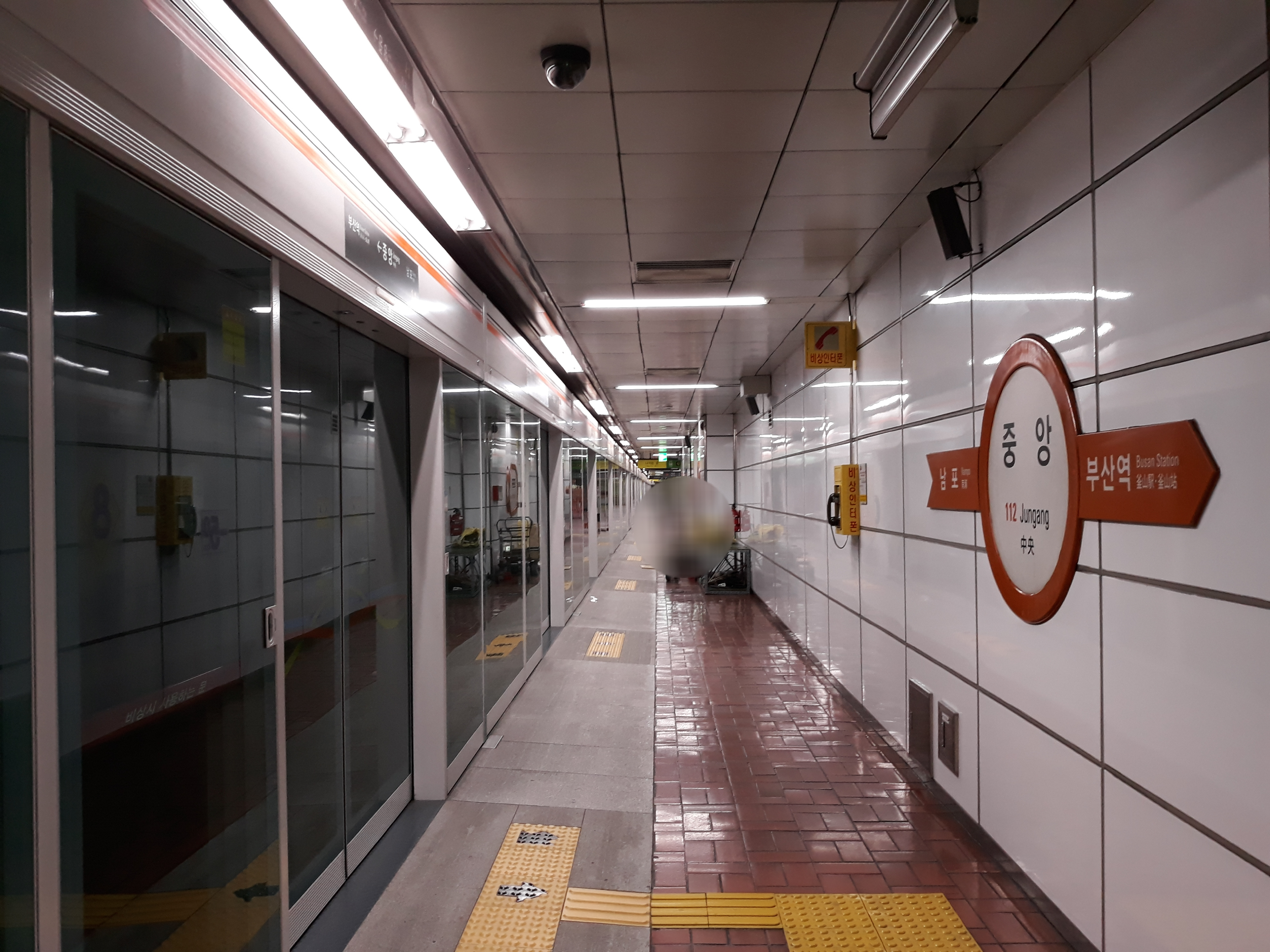 부산 도시철도 1호선 중앙역 노포 방면 승강장